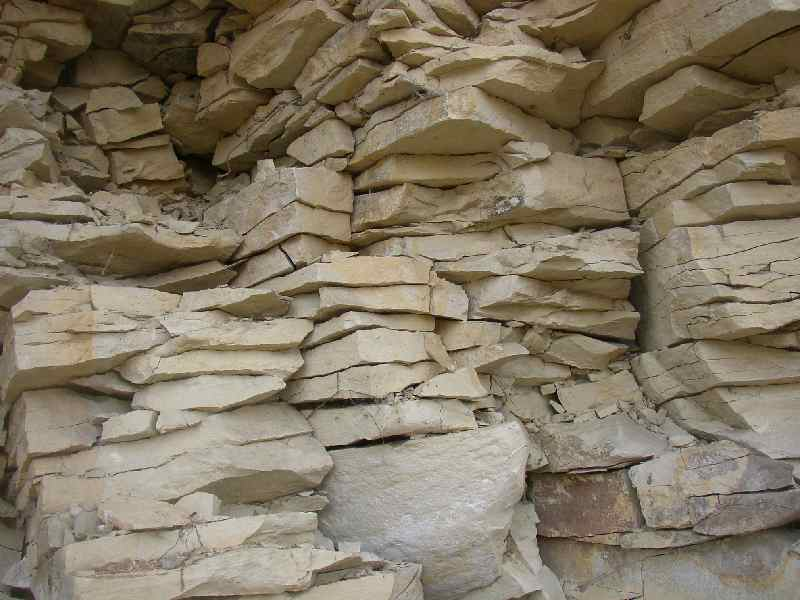 Přírodní památka Opukový lom u Přední Kopaniny v Praze. Detail opukového výchozu nad přístupovou cestou k lomu.